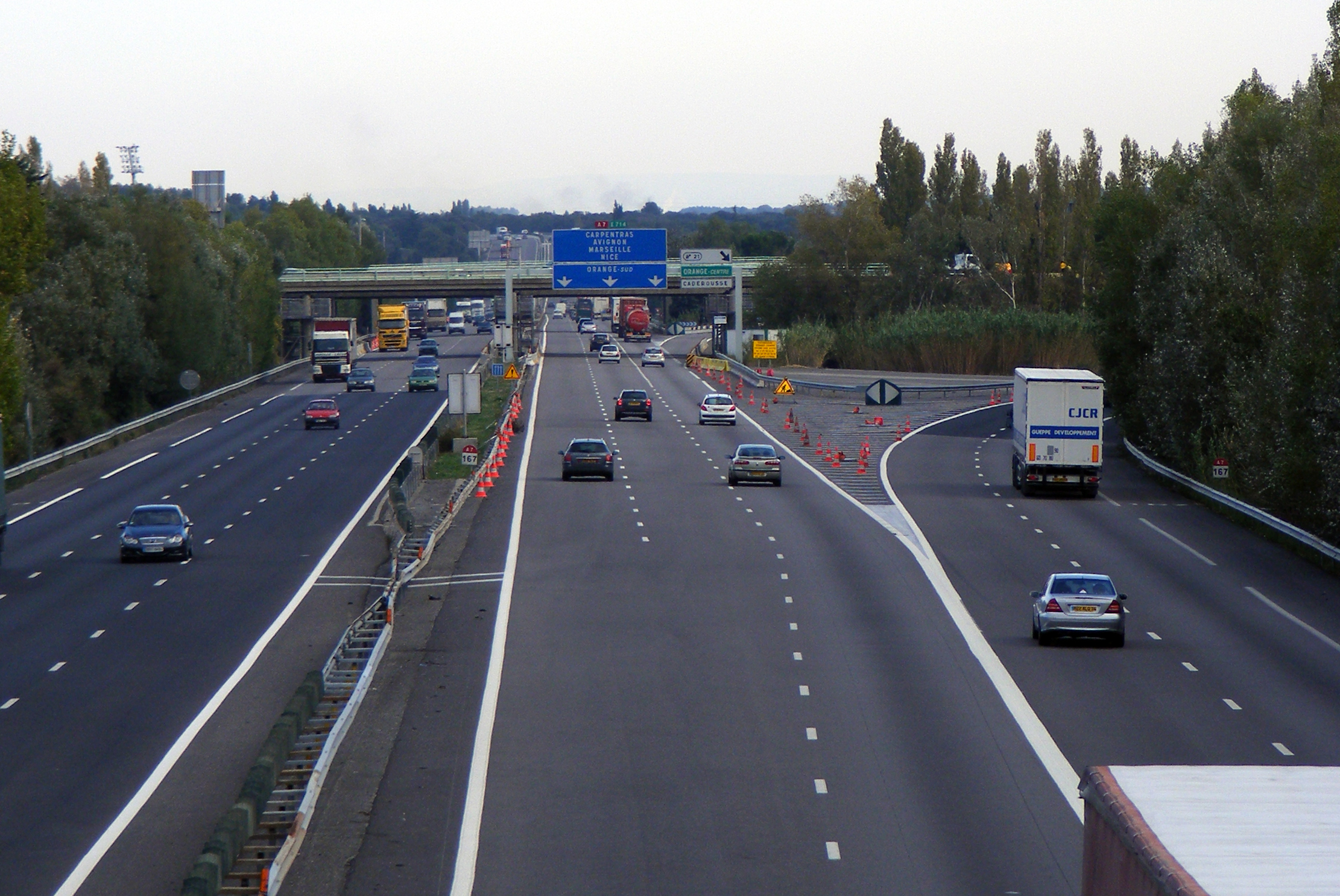 Échangeur de l'A7 et de l'A9 à Orange (Vaucluse)